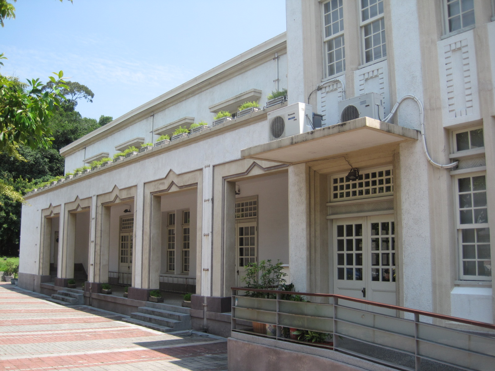 彰化公會堂的側面